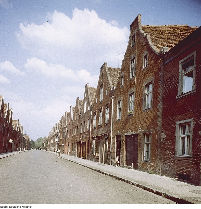 Original image description from the Deutsche FotothekPotsdam. Holländisches Viertel